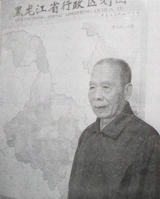 王国珍地图